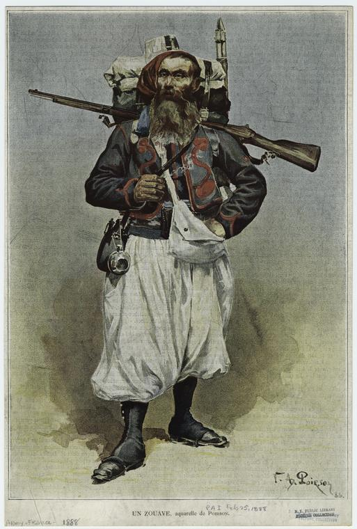 Un zouave